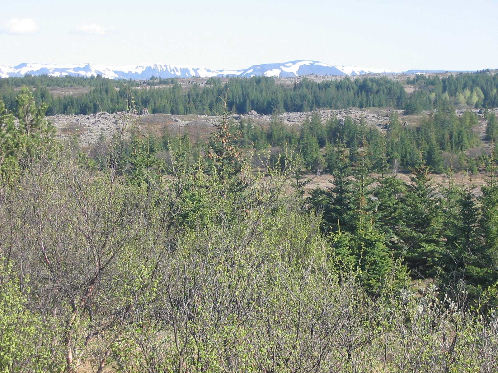 Heiðmörk, Iceland